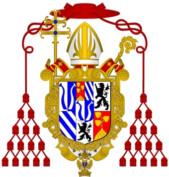 Herb Kardynała hrabiego Carlo Gaetano von Gaisruck